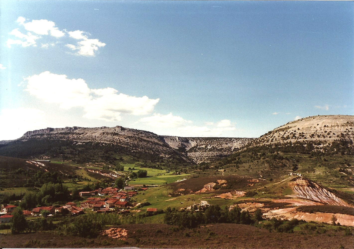 Vista panorámica de Carazo, Burgos, España